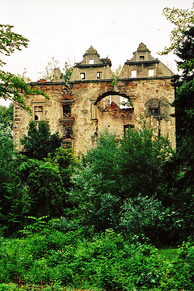 Zamek w Chocianowcu 11.12.58.